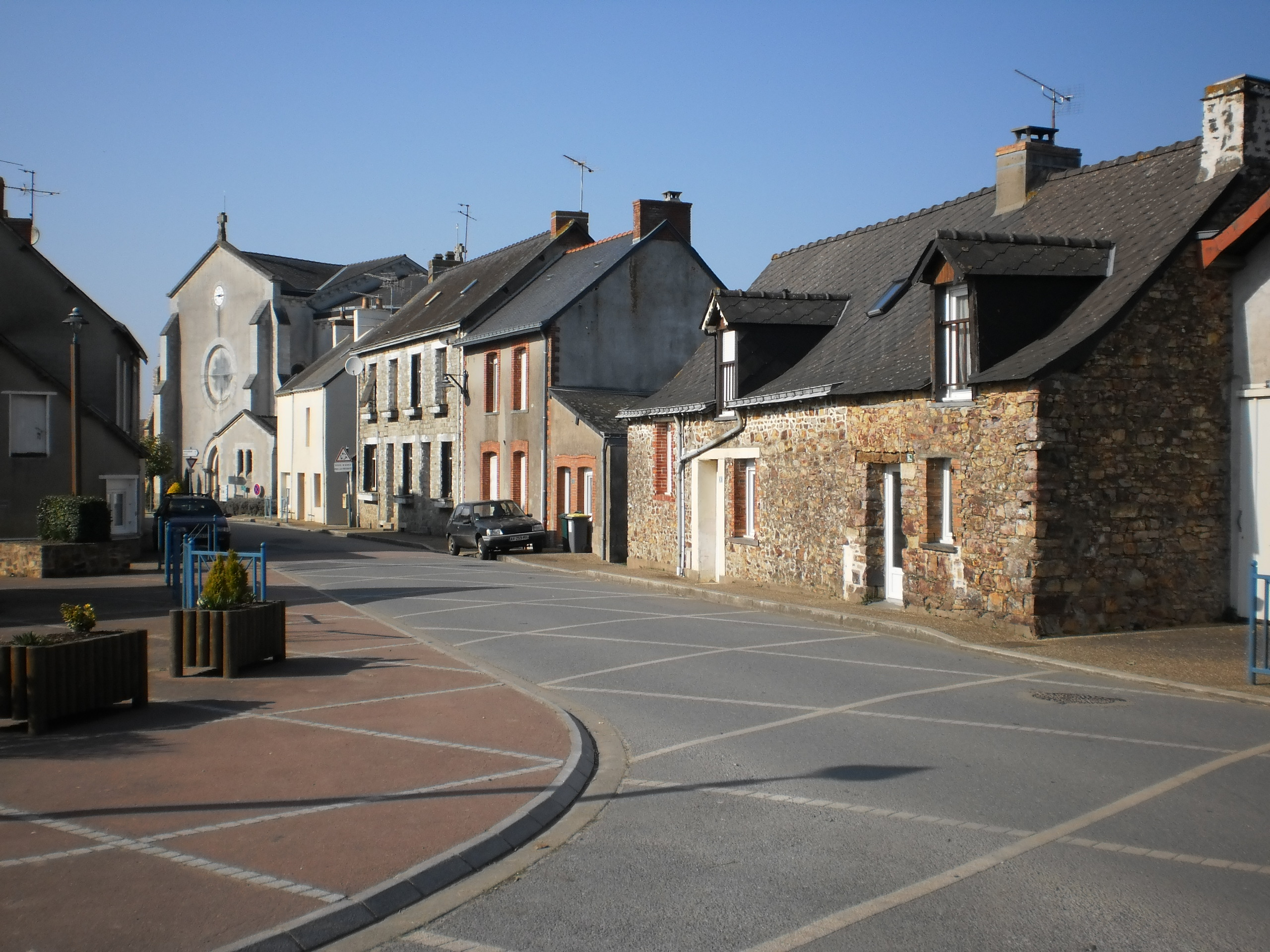 Ruffigné (Loire-Atlantique, France) - rue principale du bourg